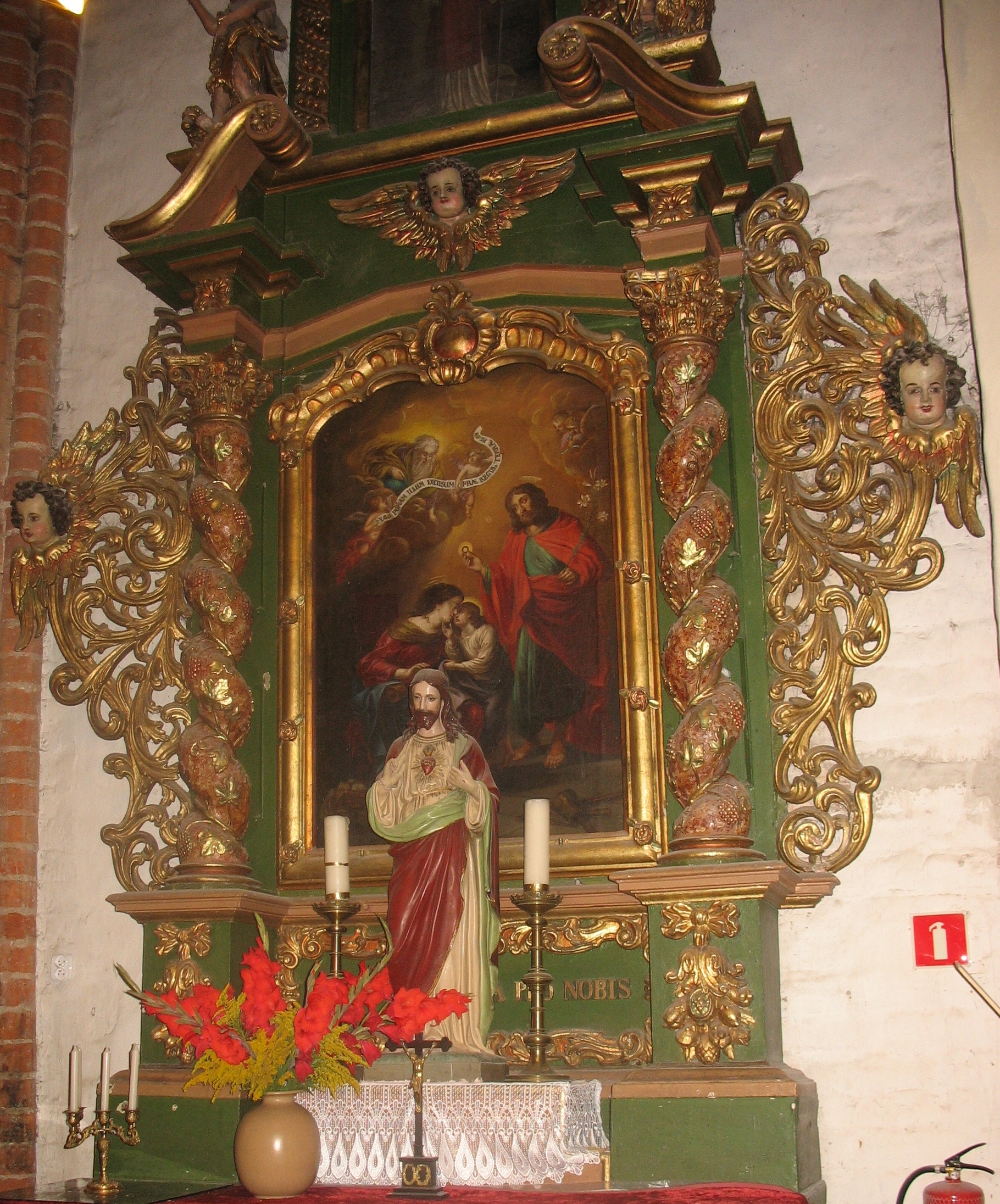 Ołtarz św. Józefa w Gniewie